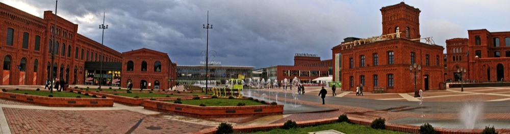 Panorama Centrum Manufaktura w Łodzi